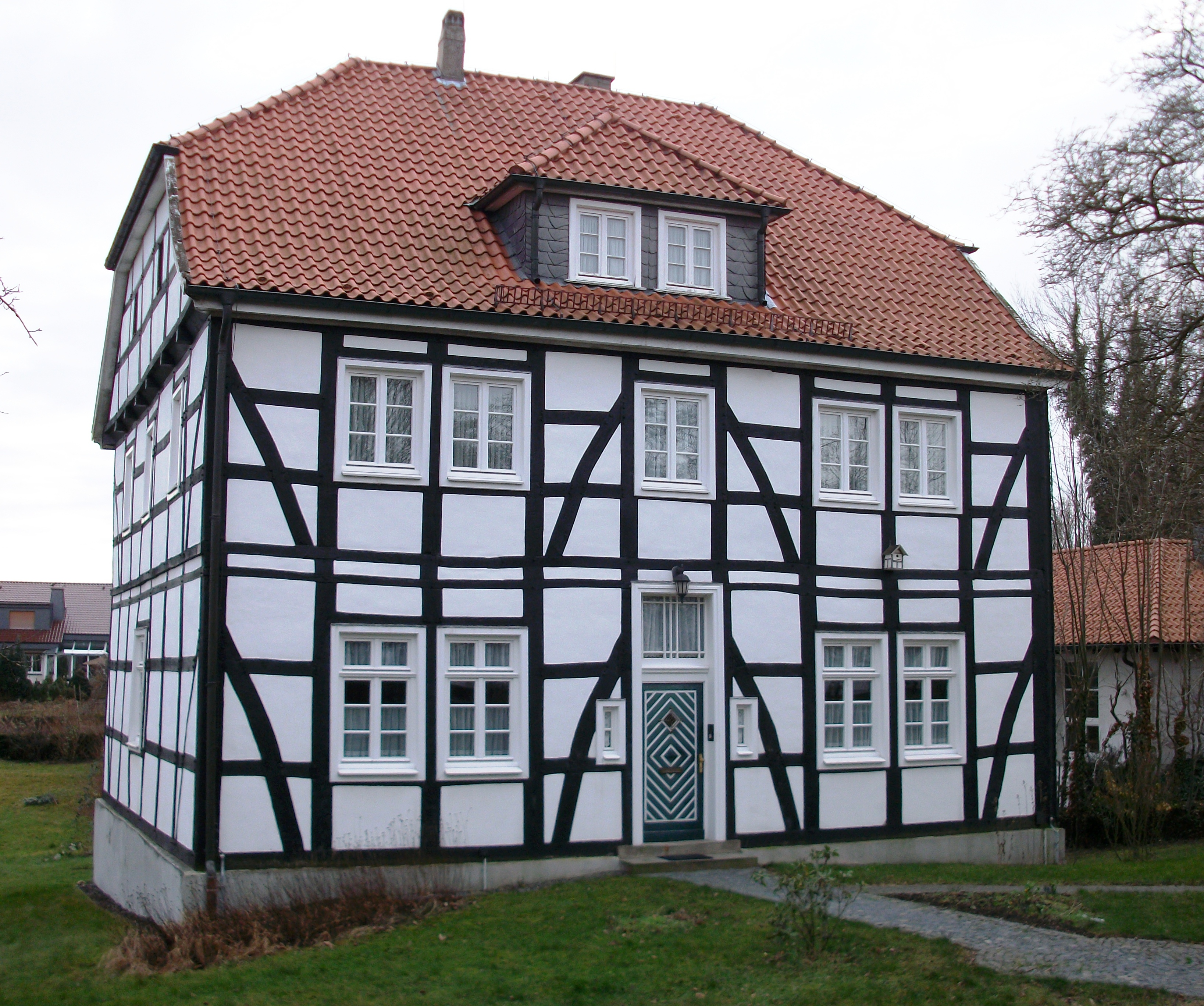 Pastorat Vosswinkel